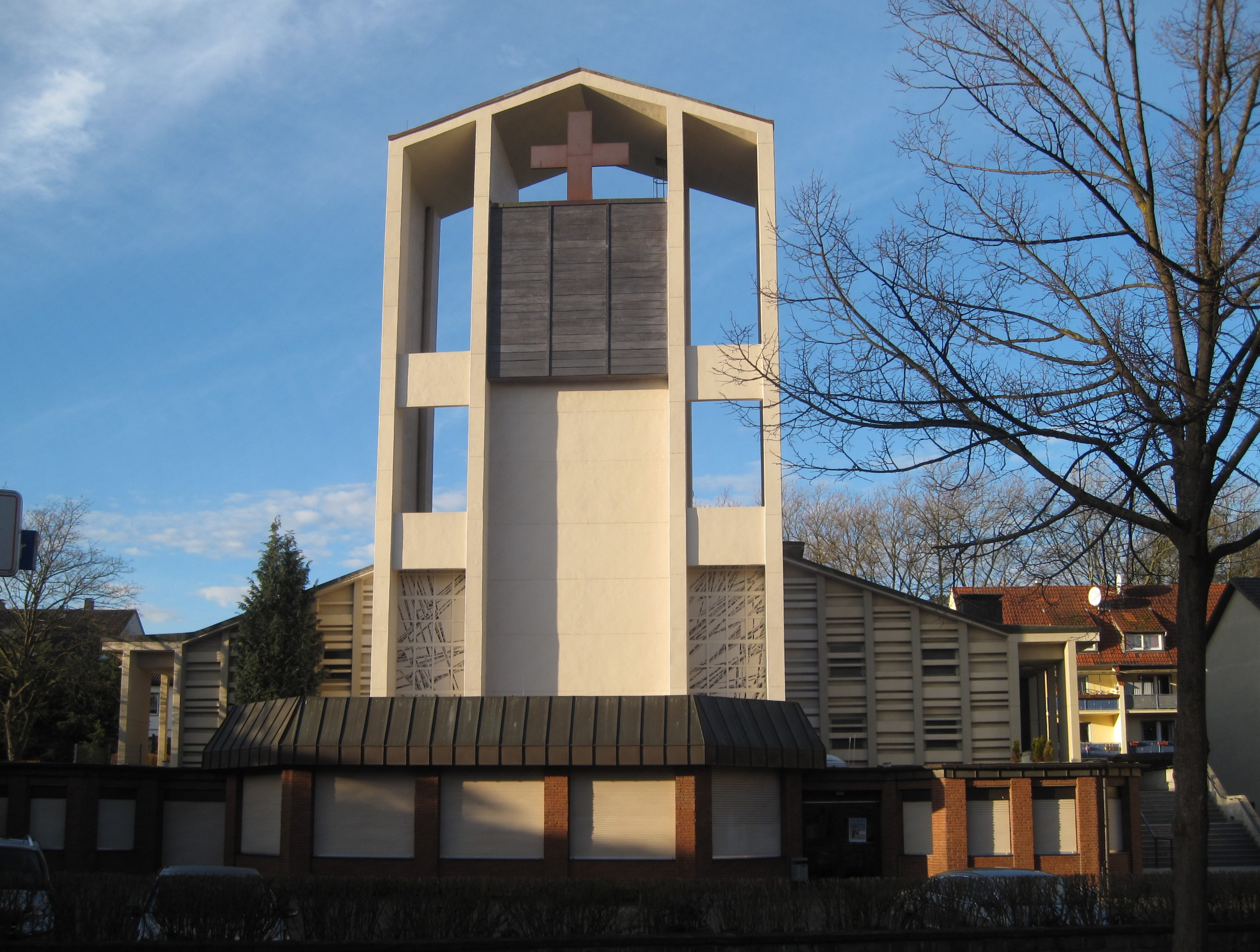 Römisch-katholischen Pfarrkirche Christkönig in Hemer.